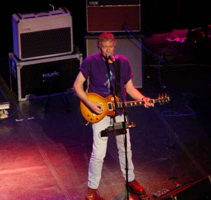 Andy Latimer bei einem Konzert am 25.10.2003